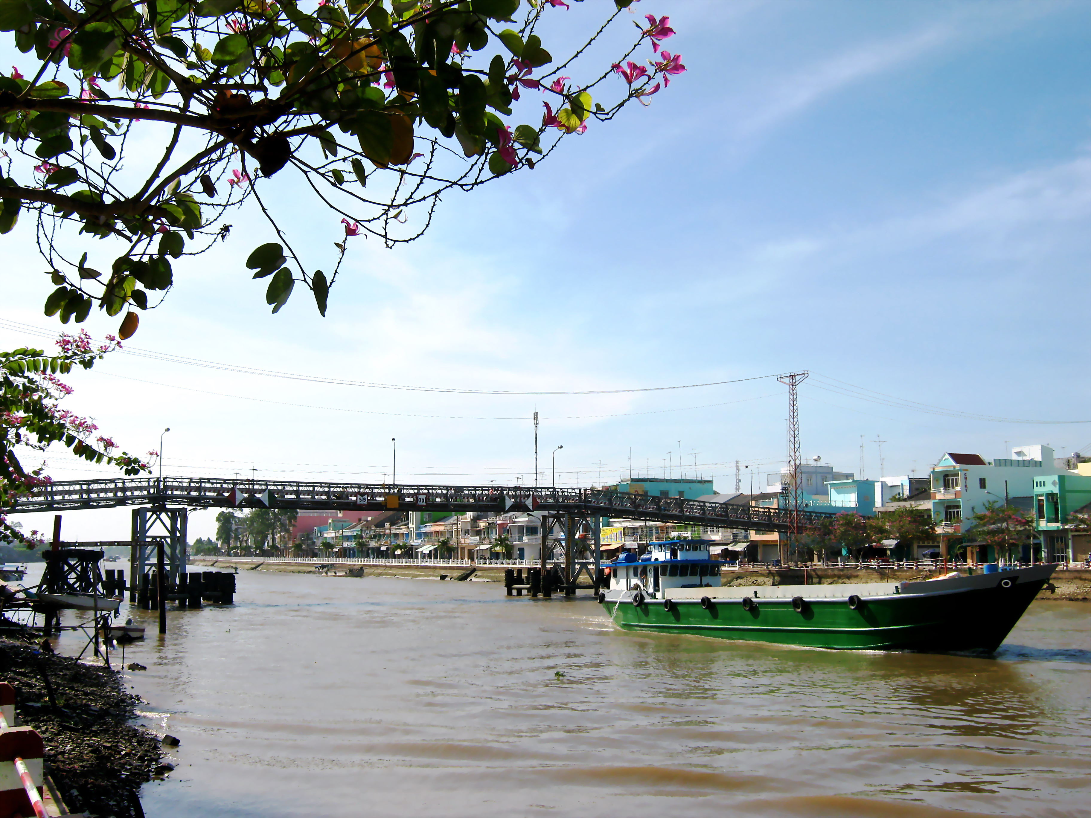 Sông Sa Đéc, đoạn cầu sắt gần chợ Sa Đéc (Đồng Tháp, Việt Nam).